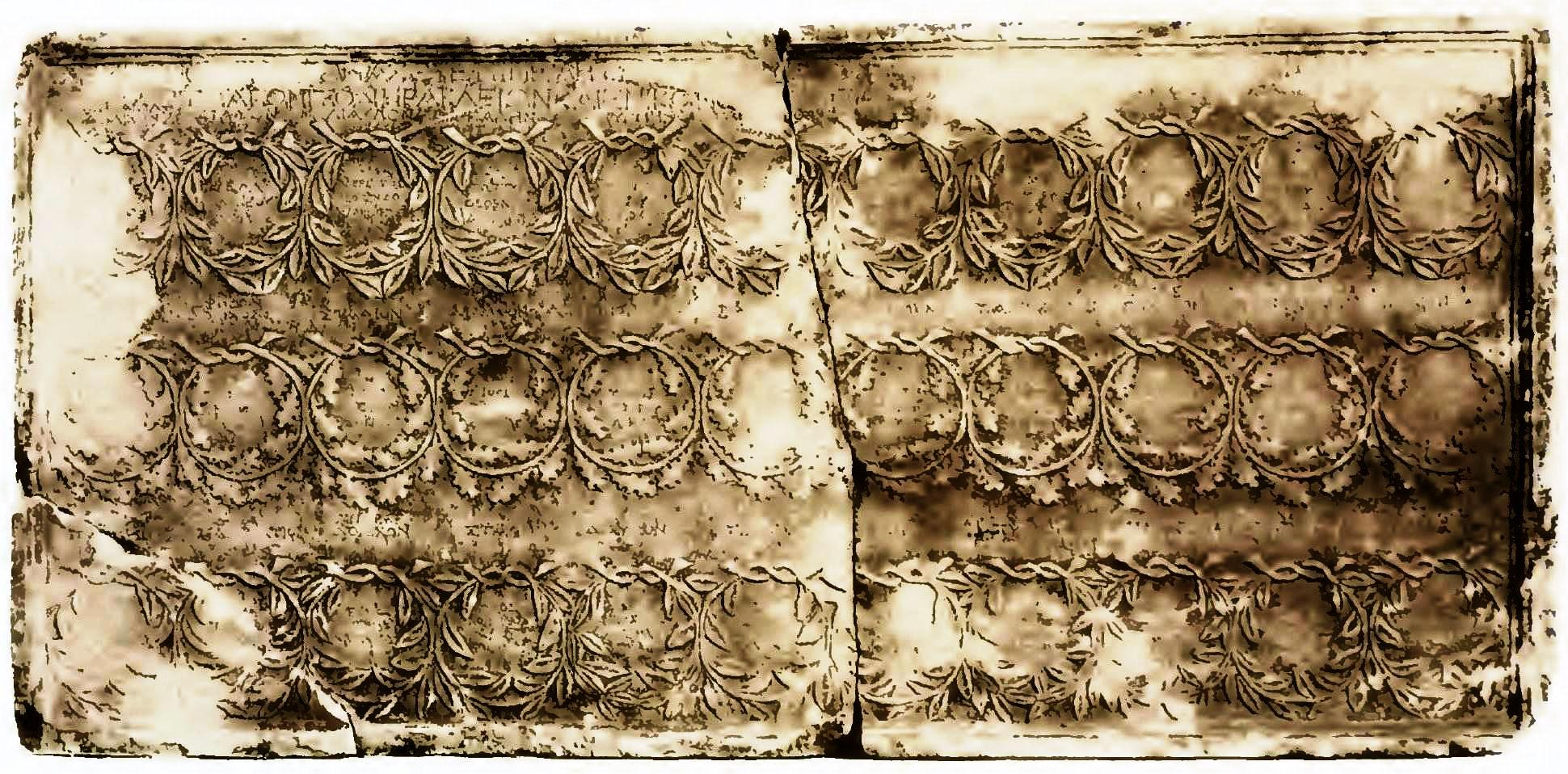 Sieger- und Ehrentafel der Heraklischen Spiele in Chalkis